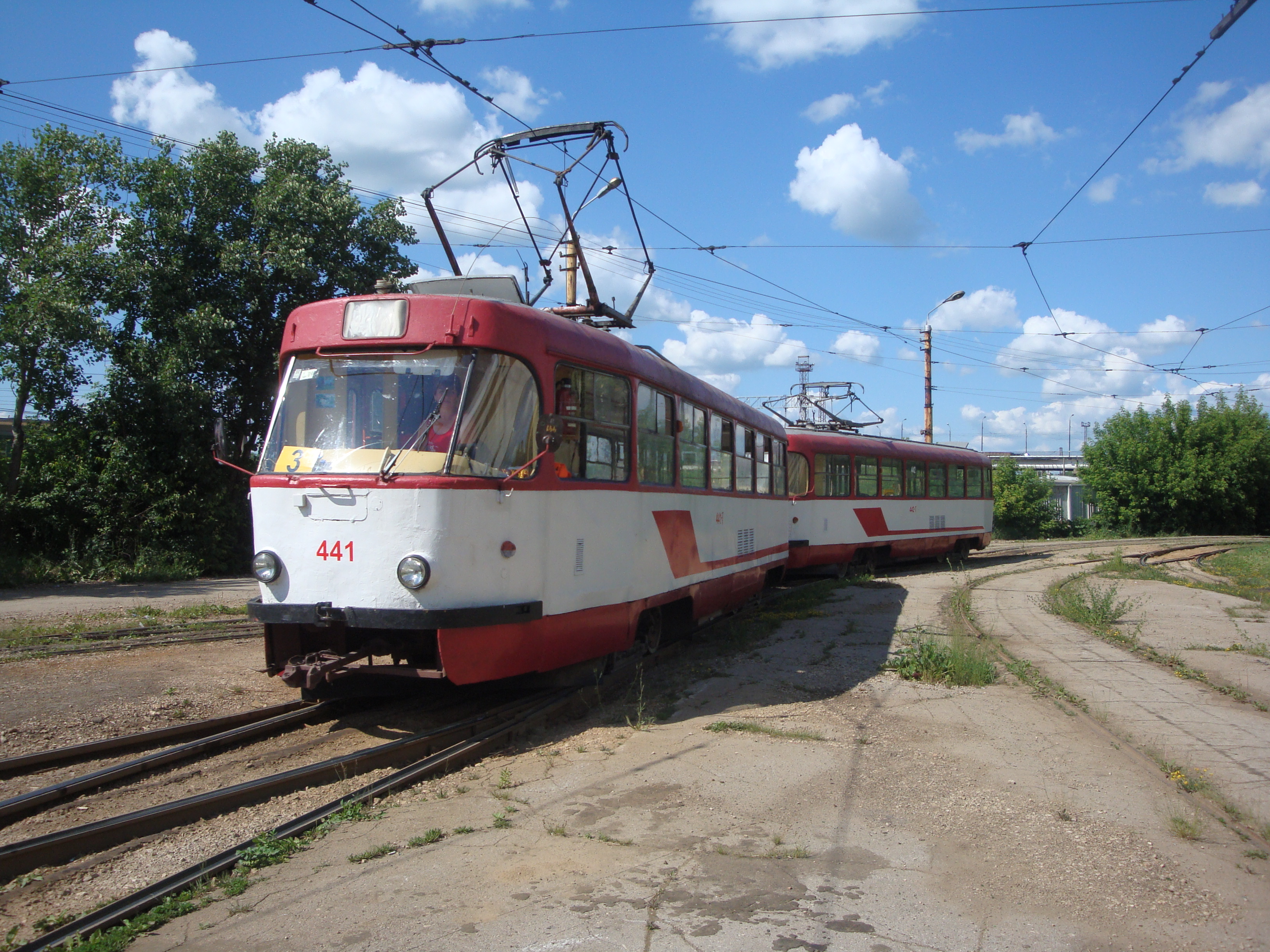 СМЕ 441-442